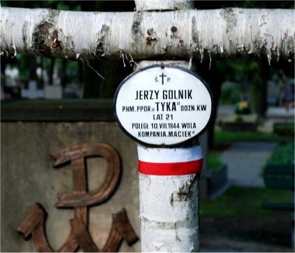 nad mogiłą Jerzego Golnika na Powązkach wojskowych w Warszawie